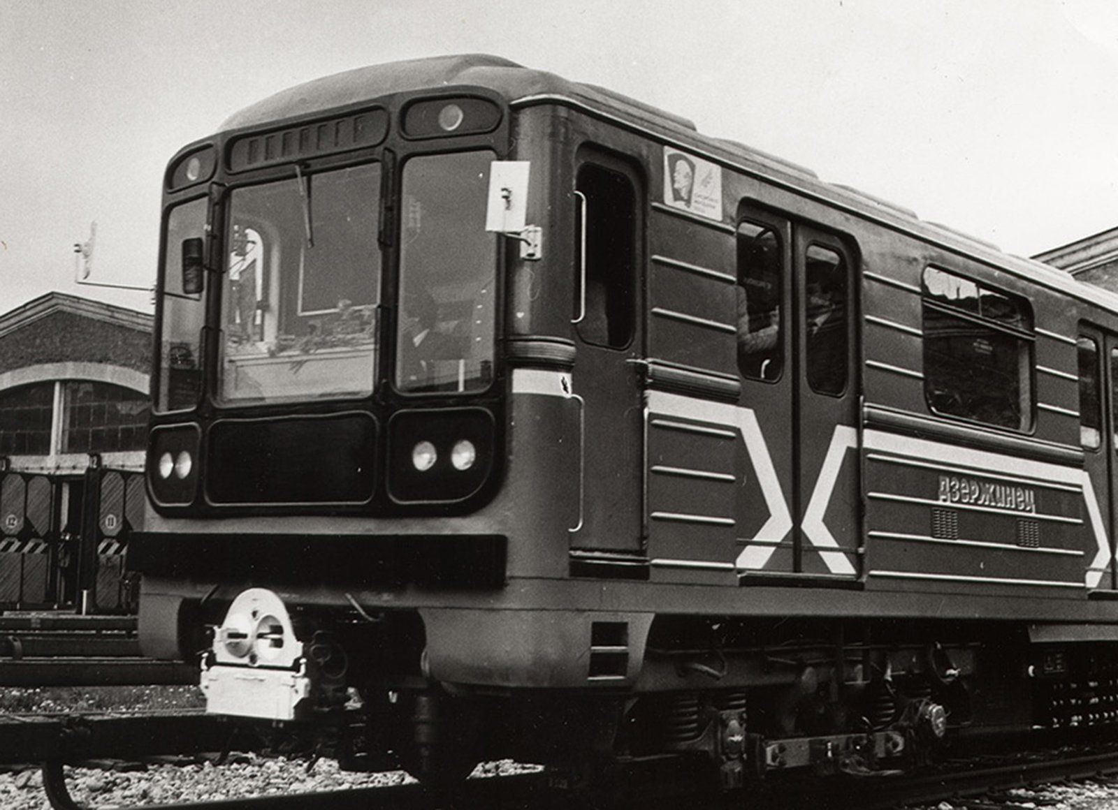 Передняя часть головного вагона типа 81-717 именного электропоезда «Дзержинец» в Московском метро